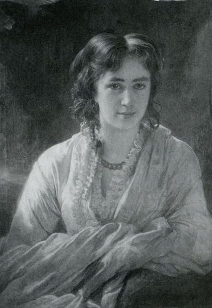 Княгиня Мария Апполинарьевна Барятинская, ур. Бутенева (1835—1906).